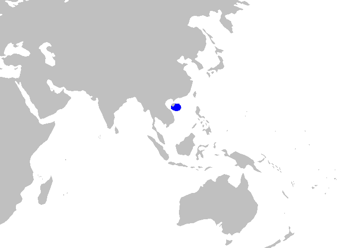 Distribution map for Etmopterus decacuspidatus